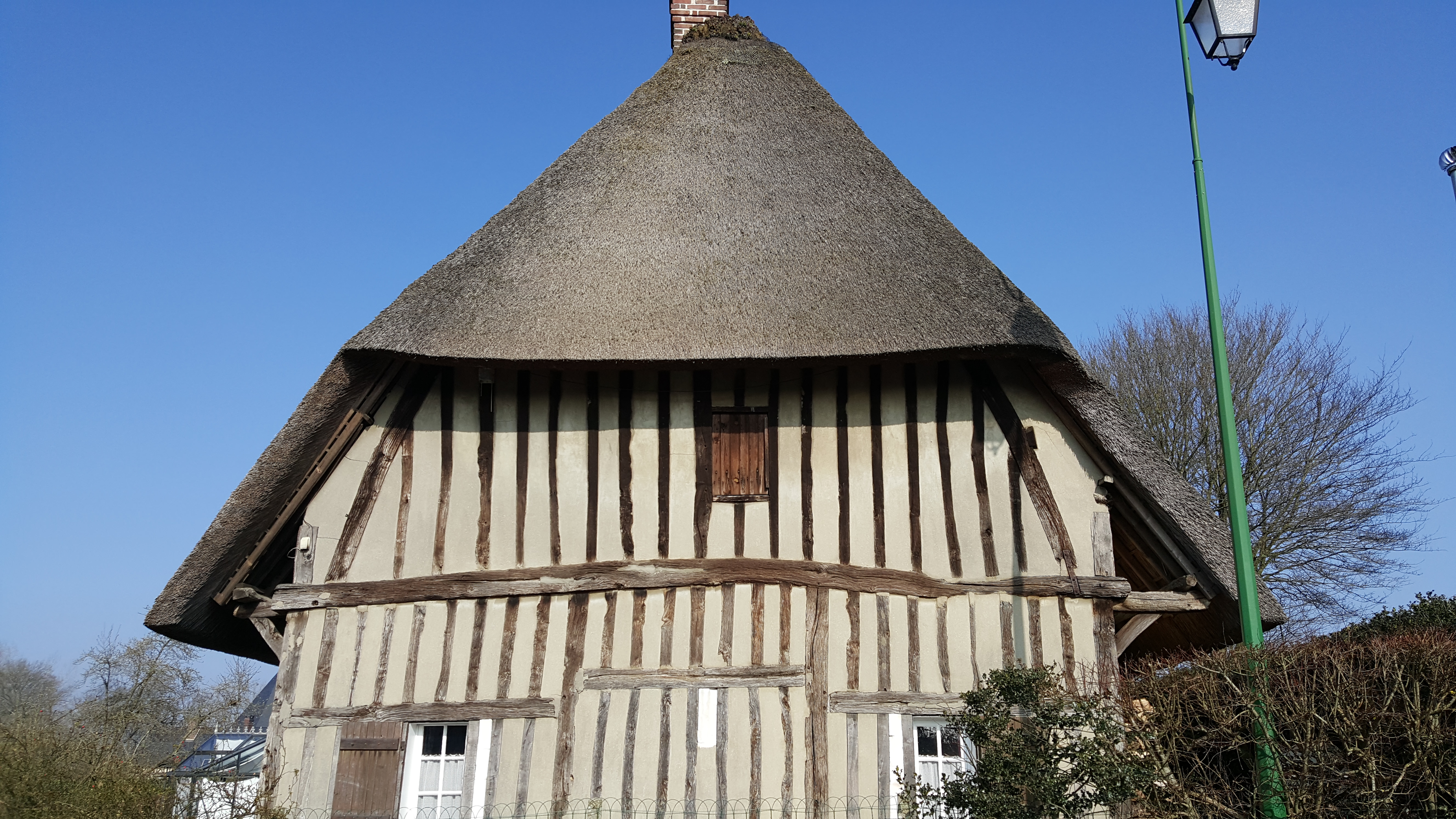 Longère Normande typique avec son toit de chaume